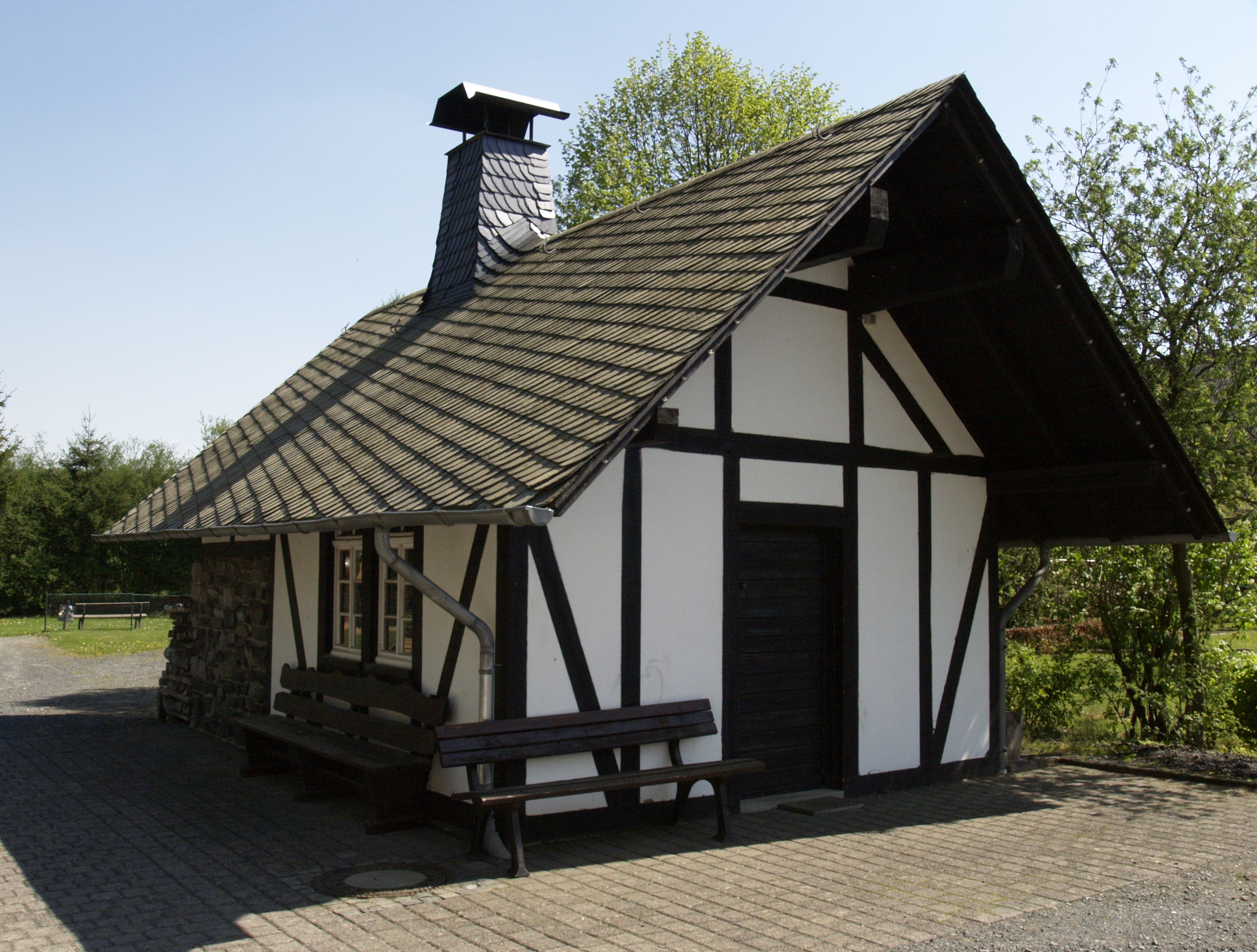 Der sogenannte Oberdreiser "Backes", in dem noch regelmäßig Brot für den Eigenbedarf gebacken wird.